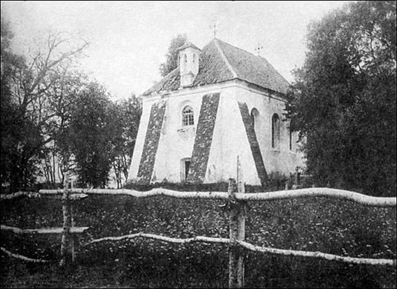 Zbór luterański we wsi Gojcieniszki na Białorusi (obecnie ruina)